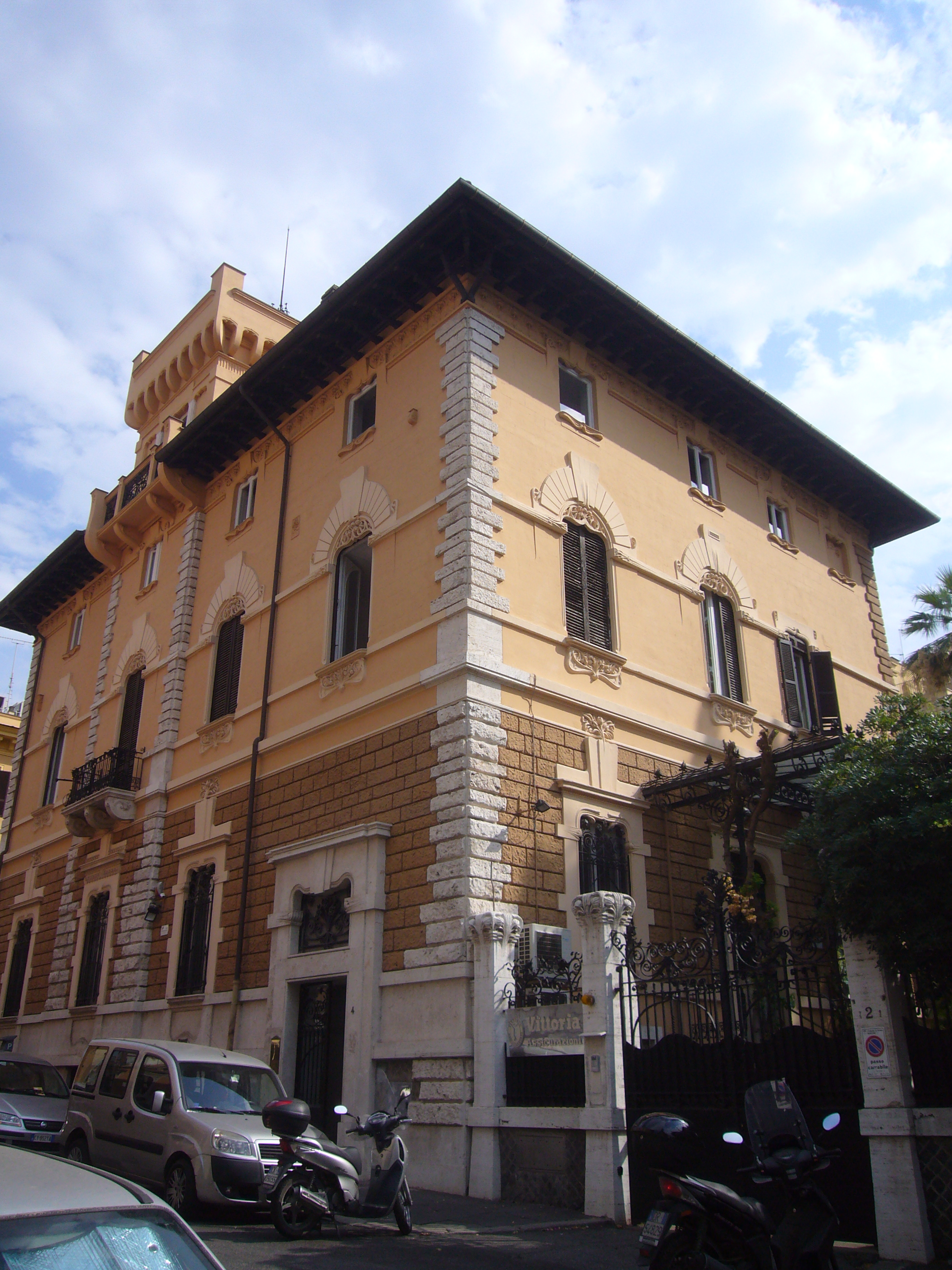 Roma, villino Florio, lato via Abruzzi (progettista Ernesto Basile)